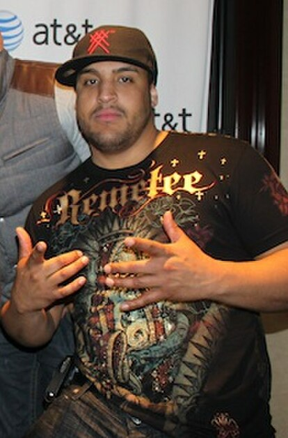 Aventura, agrupación musical dominico-estadounidense.